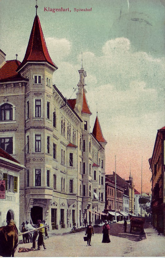 Ansichtskarte vom „Spitra-Hof“ an der Bahnhofstraße in Klagenfurt.